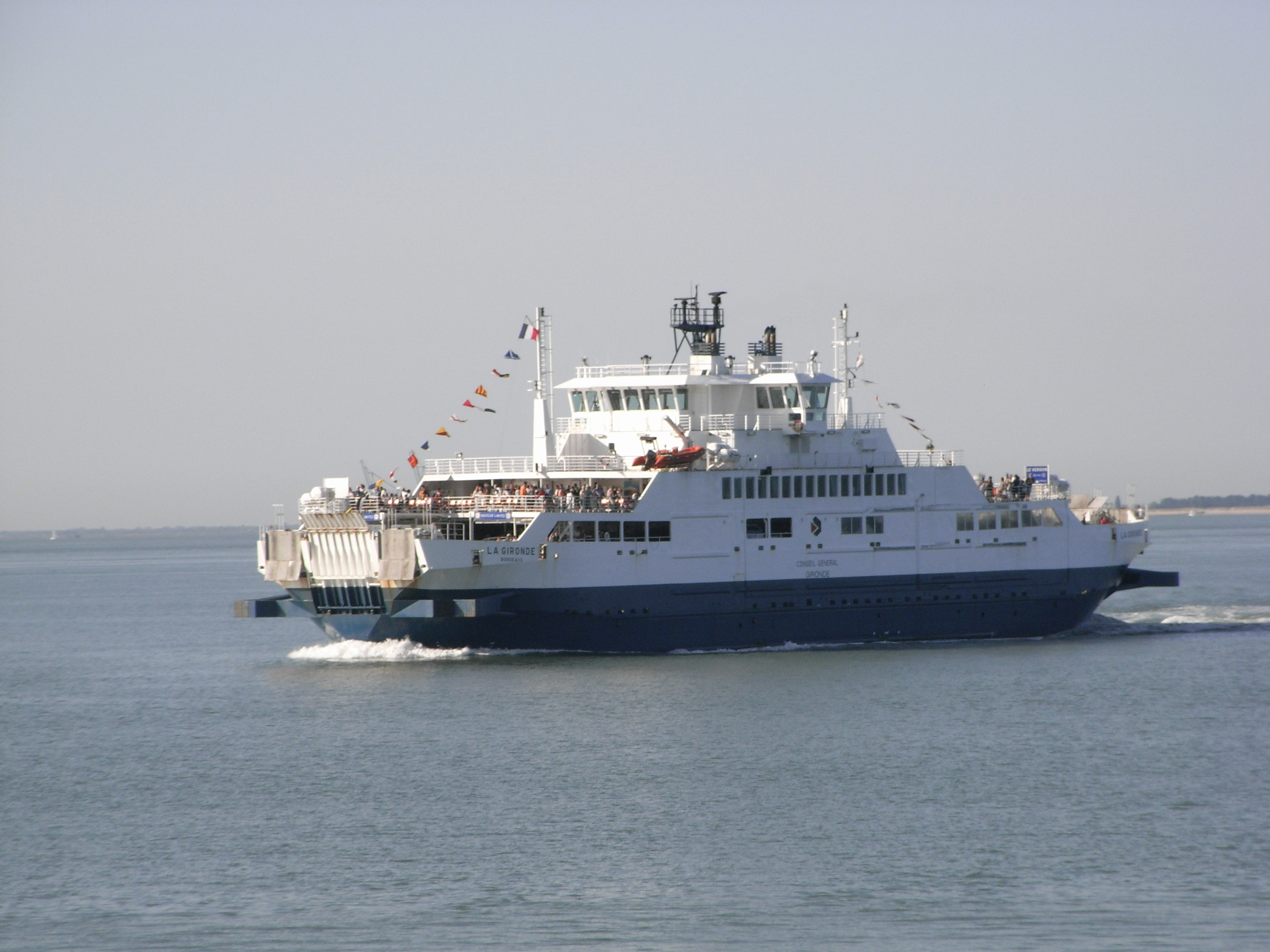 Bac "La Gironde" assurant la liaison sur l'estuaire de la Gironde entre Royan (Charente-Martitime) et Le Verdon-sur-Mer (Gironde).